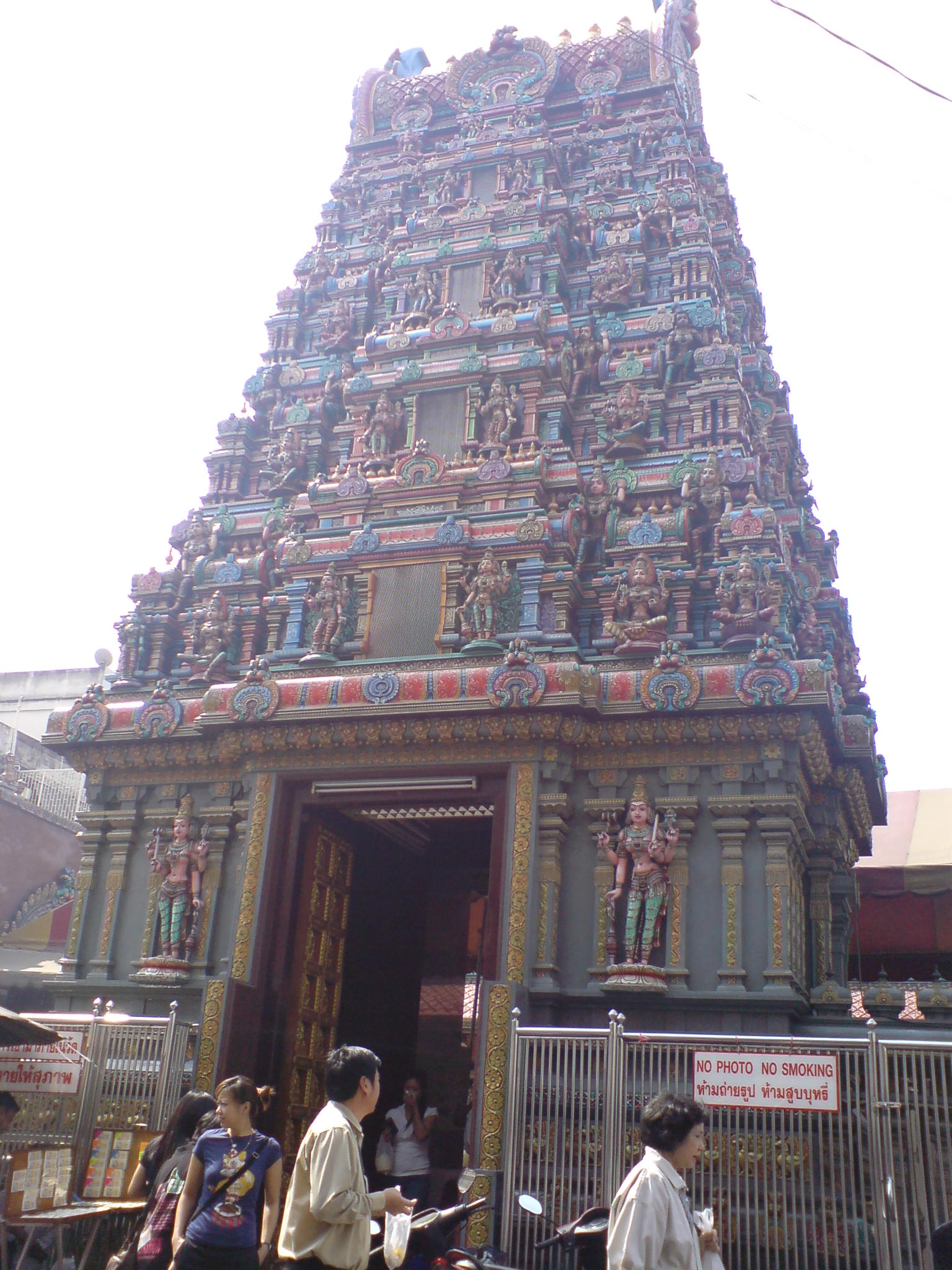 Sri Maha Mariamman Temple in Bangkok, Thailand